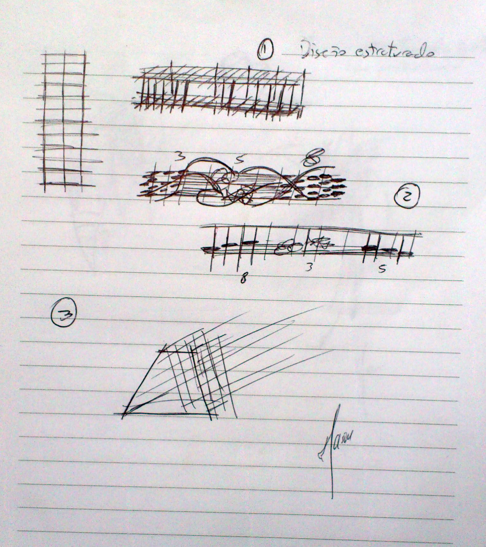 Un bosquejo ayuda a un Diseñador a preparar su trabajo y visualizar posibles errores o caminos a tomar a la hora de realizar la labor final.